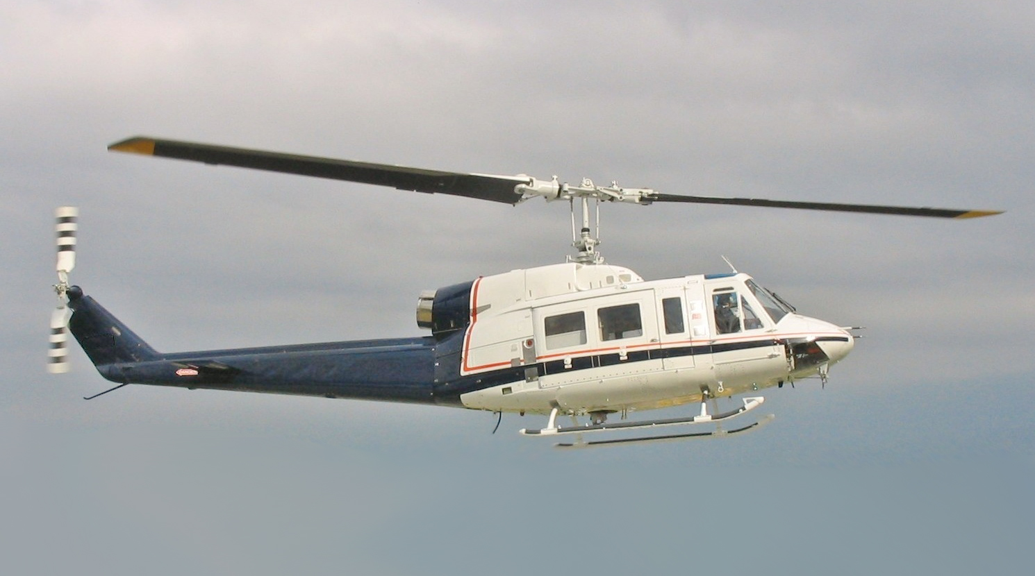 by user Meggar